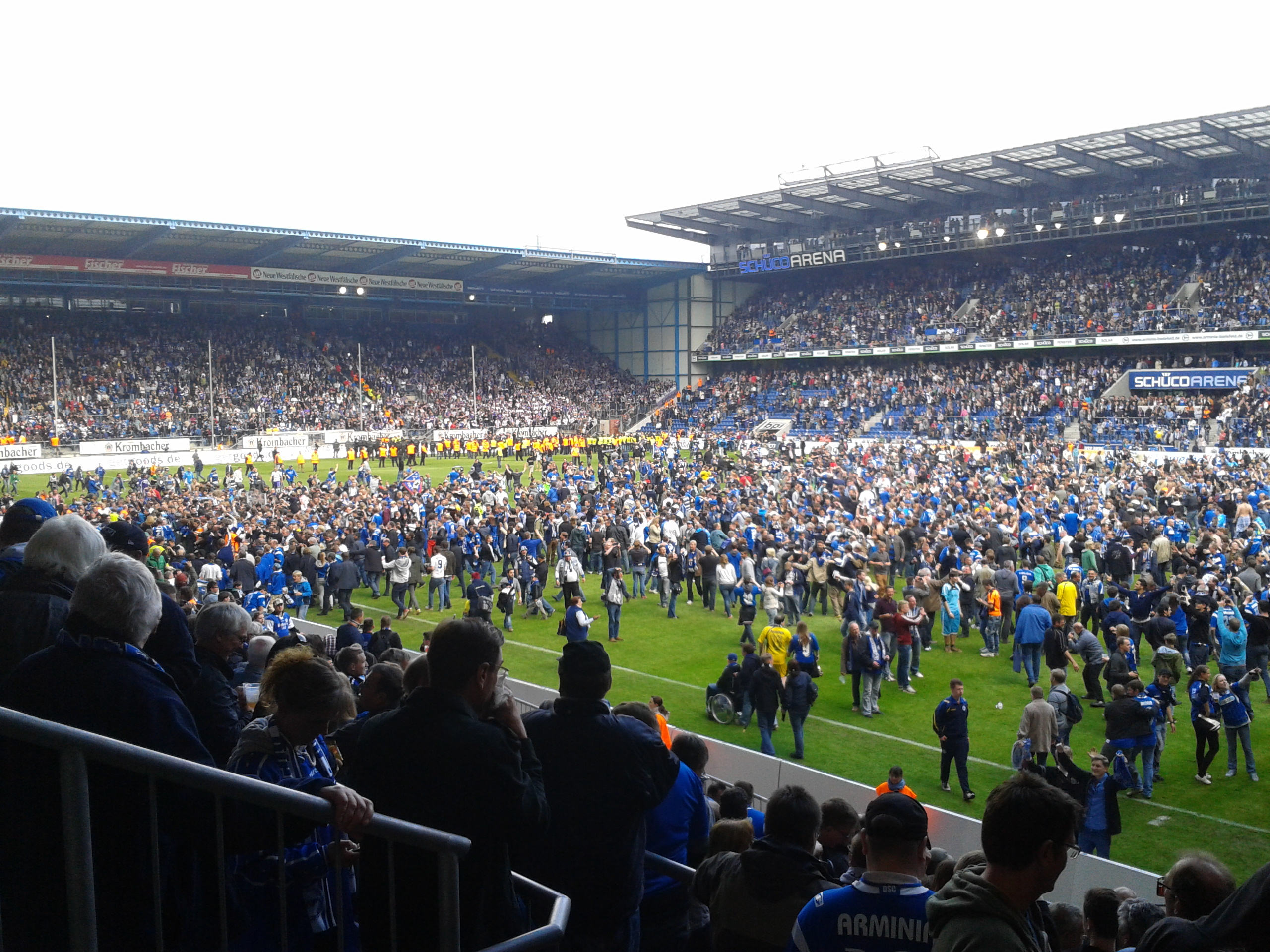 Platzsturm auf der Bielefelder Alm nach einem 1:0 gegen den VfL Osnabrück am 11. Mai 2013. Mit diesem Sieg gelang der Arminia die Rückkehr in die 2. Bundesliga.